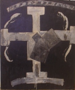 peinture